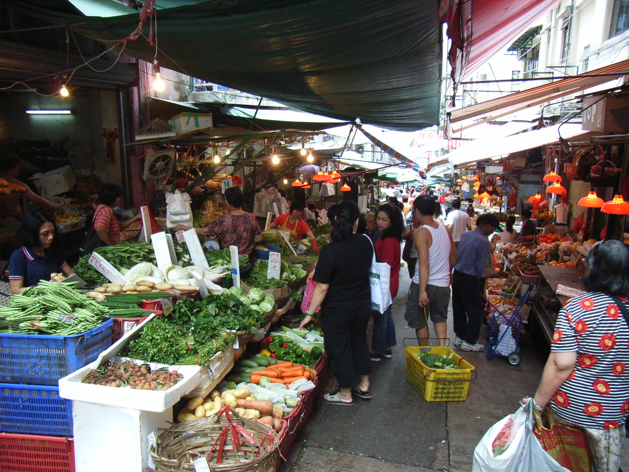 嘉咸街是中環的街市區內的一條街道，街上沿途有不少街邊賣濕貸的小商販 by TangHon